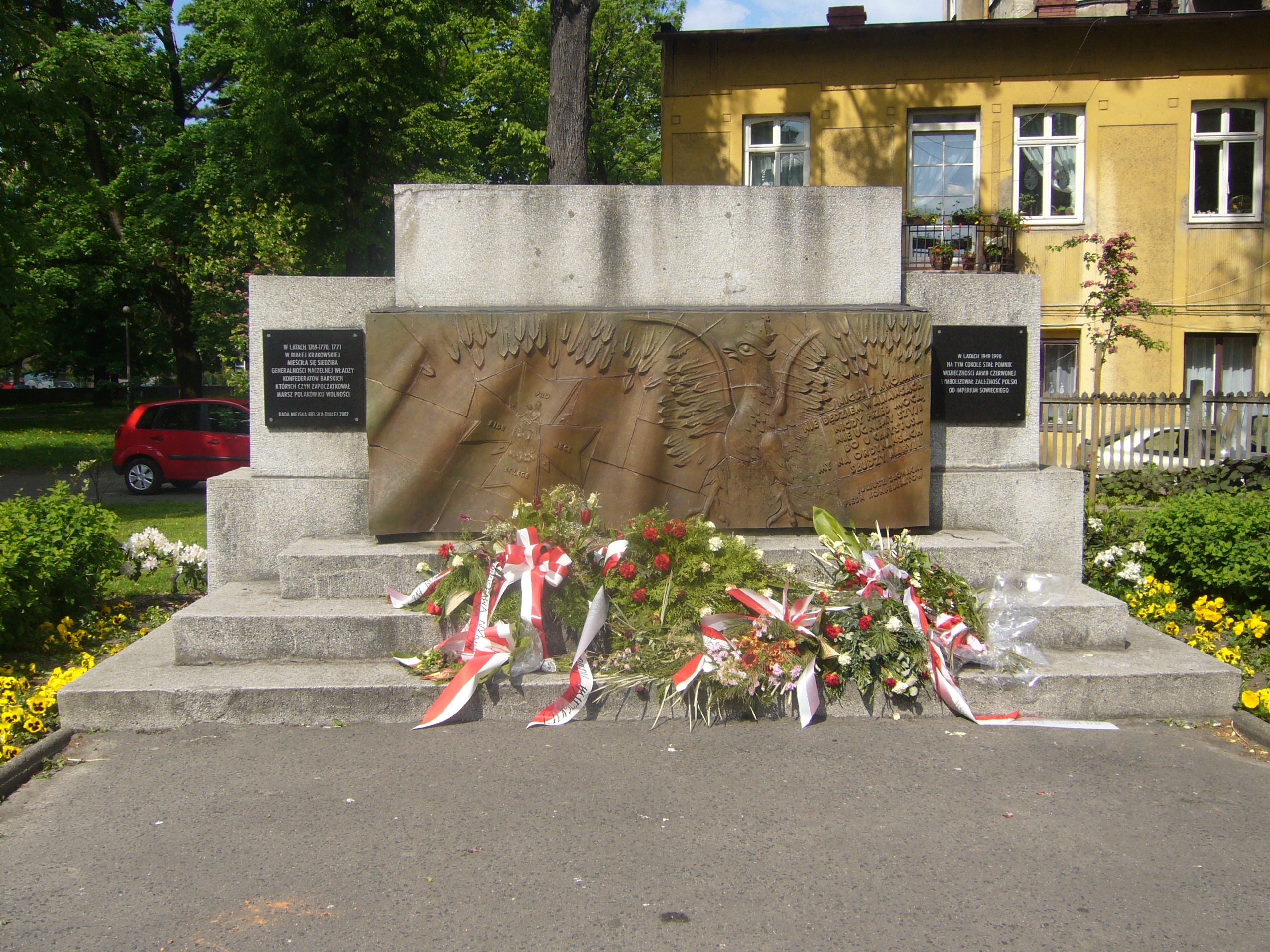 Pomnik Konfederatów Barskich w Bielsku-Białej